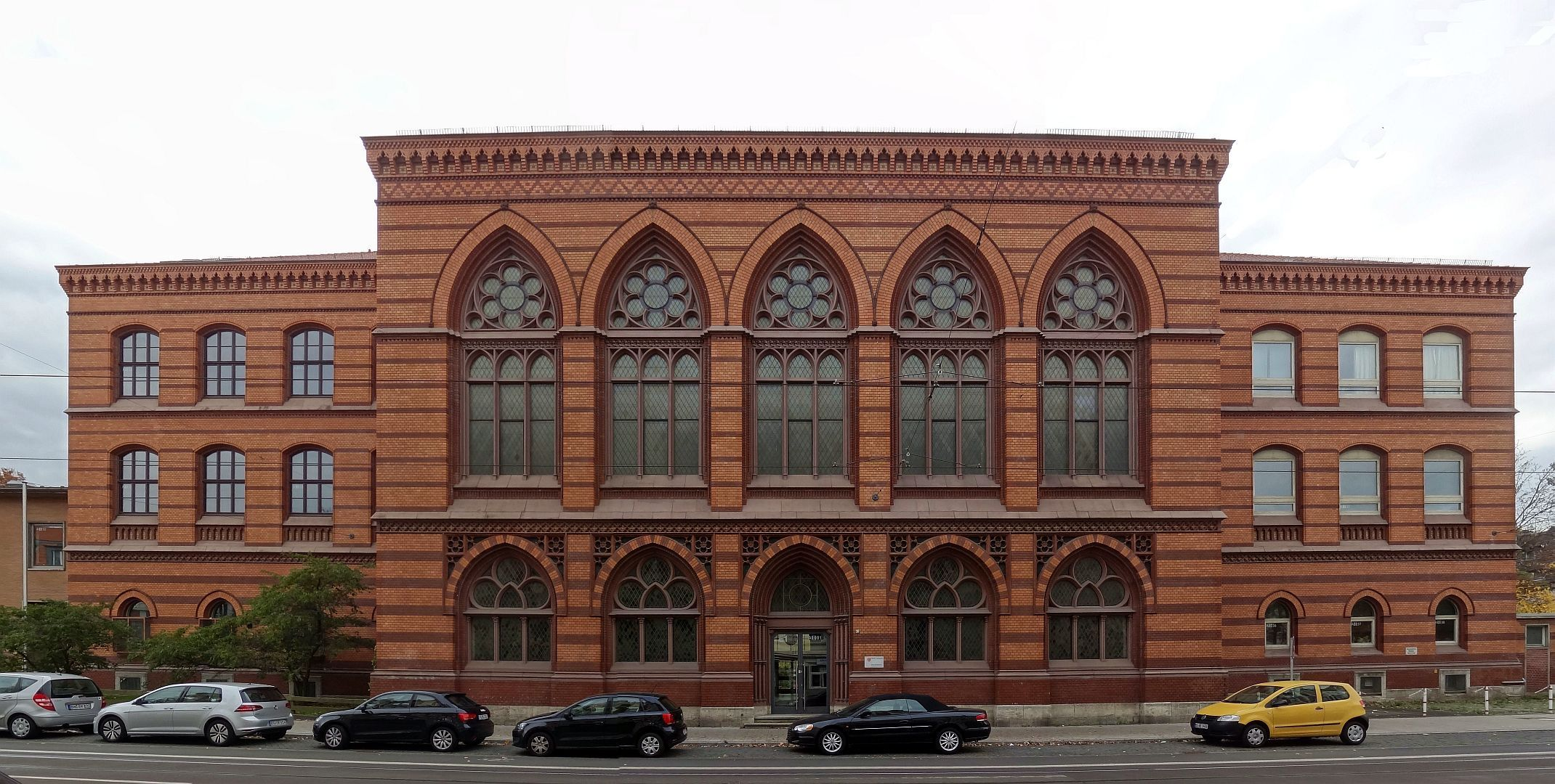 Hauptgebäude des Wilhelm-Gymansiums; Leonhardstr. 63 in Braunschweig. Frontalansicht generiert aus mehreren Einzelaufnahmen; je eine Fensterachse rechts und links des Mittelresalits sind verdeckt.